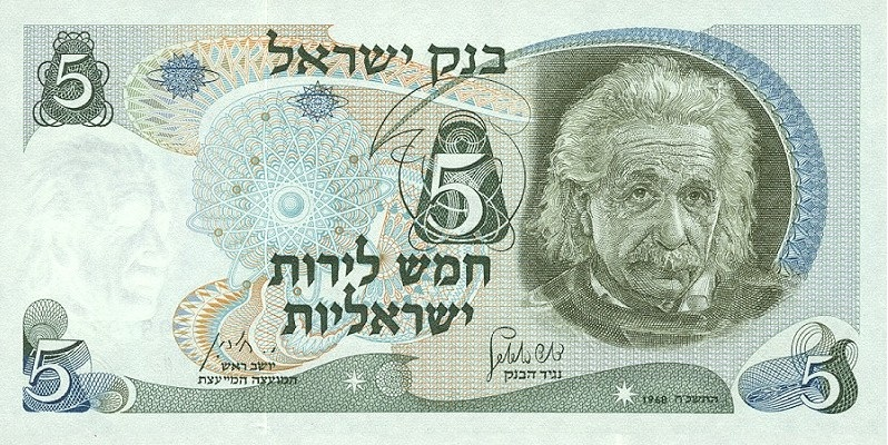 שטר של חמש לירות